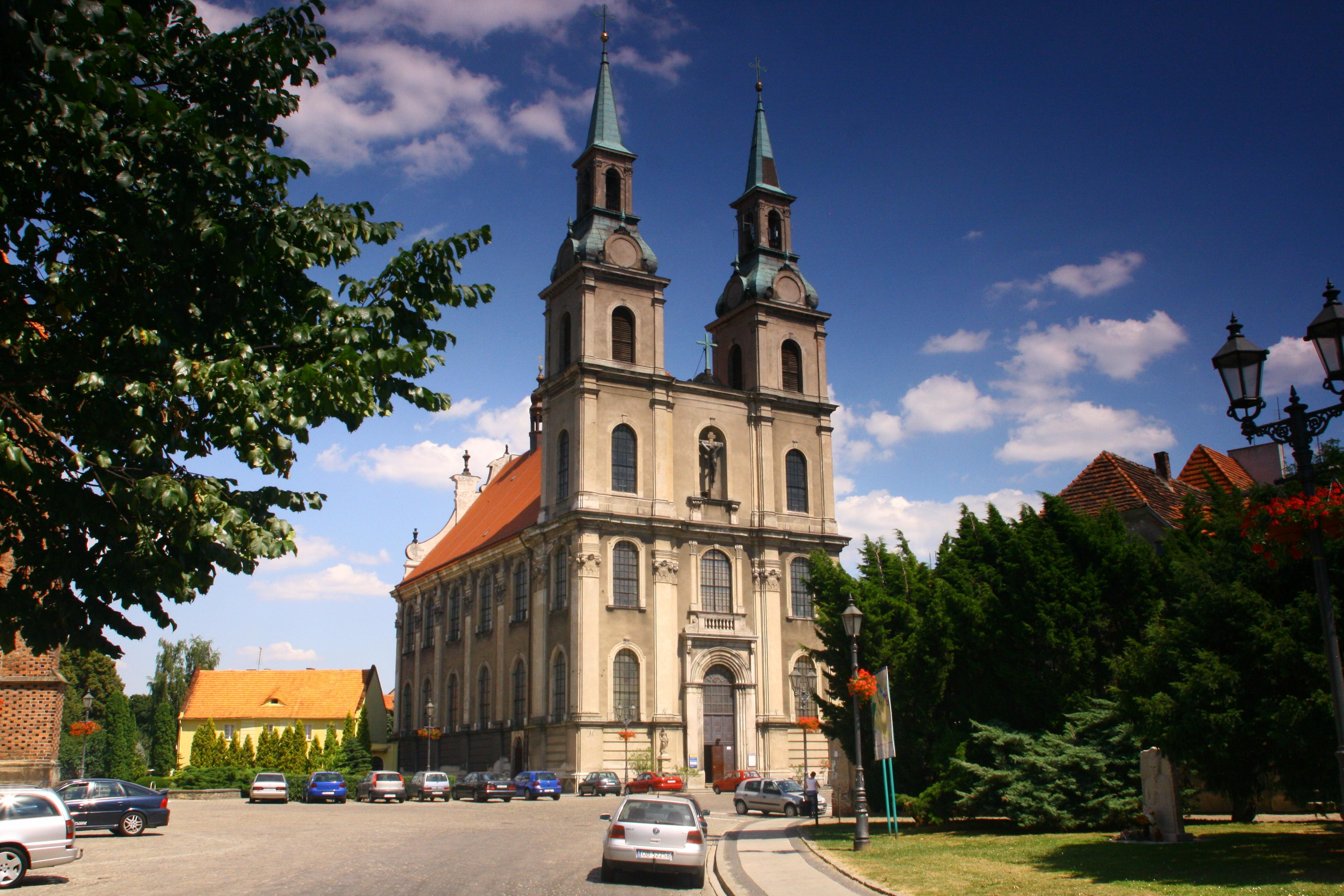 Brzeg, Poland